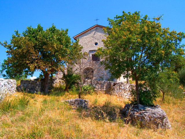 La chiesa di Santa Barbara a San Marco dei Cavoti (BN), situata sull'omonimo Toppo.